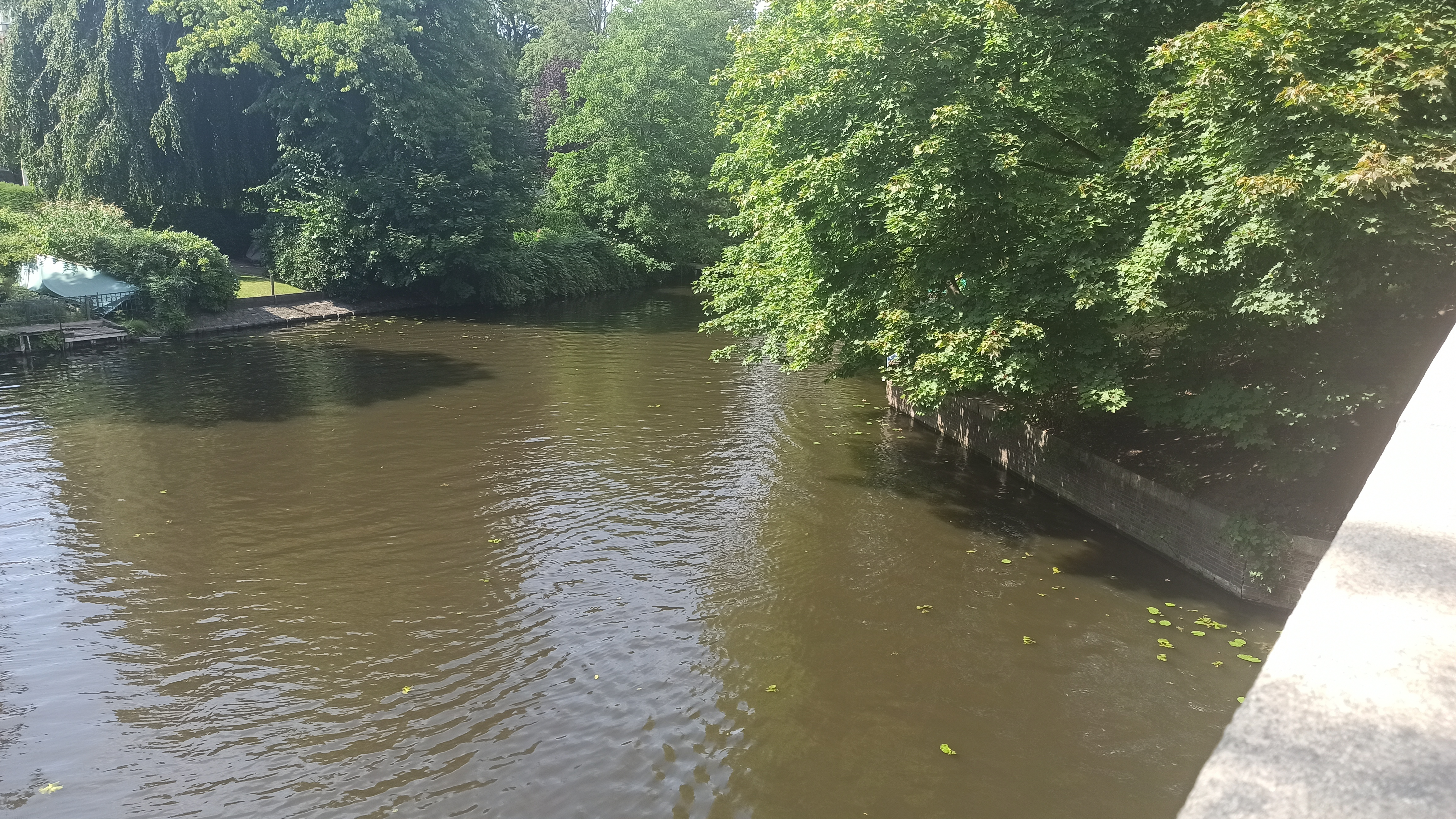 Goldbekkanal fließt in den Rondeelkanal